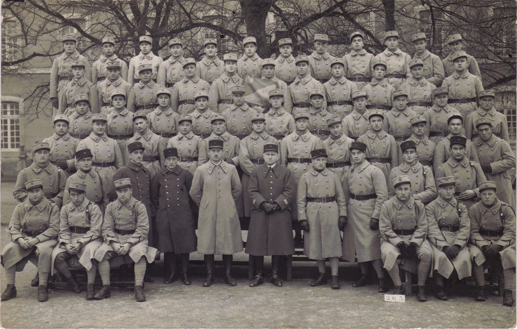 Photo de groupe du 21ième Régiment d'Infanterie à Chaumont en 1936. Le capitaine Pierre-Elie Jacquot figure en bas, au milieu.